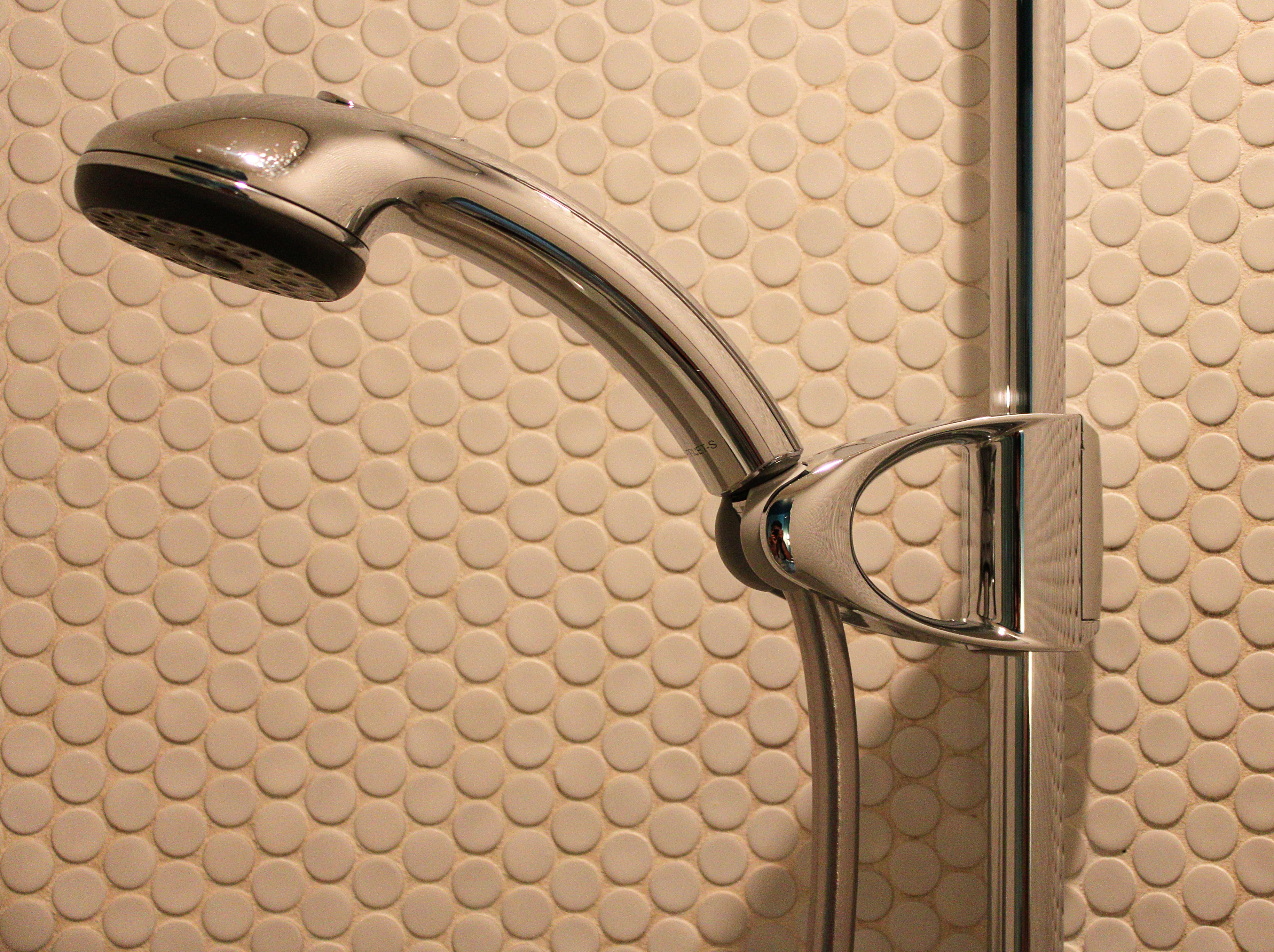 Helgoland; Hotel Atoll; Dusche